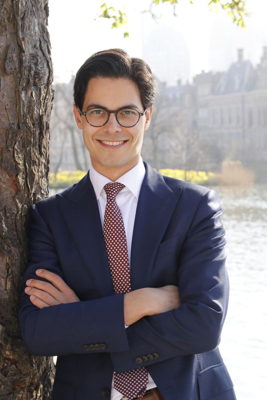 Rob Jetten